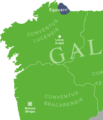 Mapa que amosa a situación aproximada da tribo dos egobarros ou Egovarri, na provincia romana da Gallaecia.